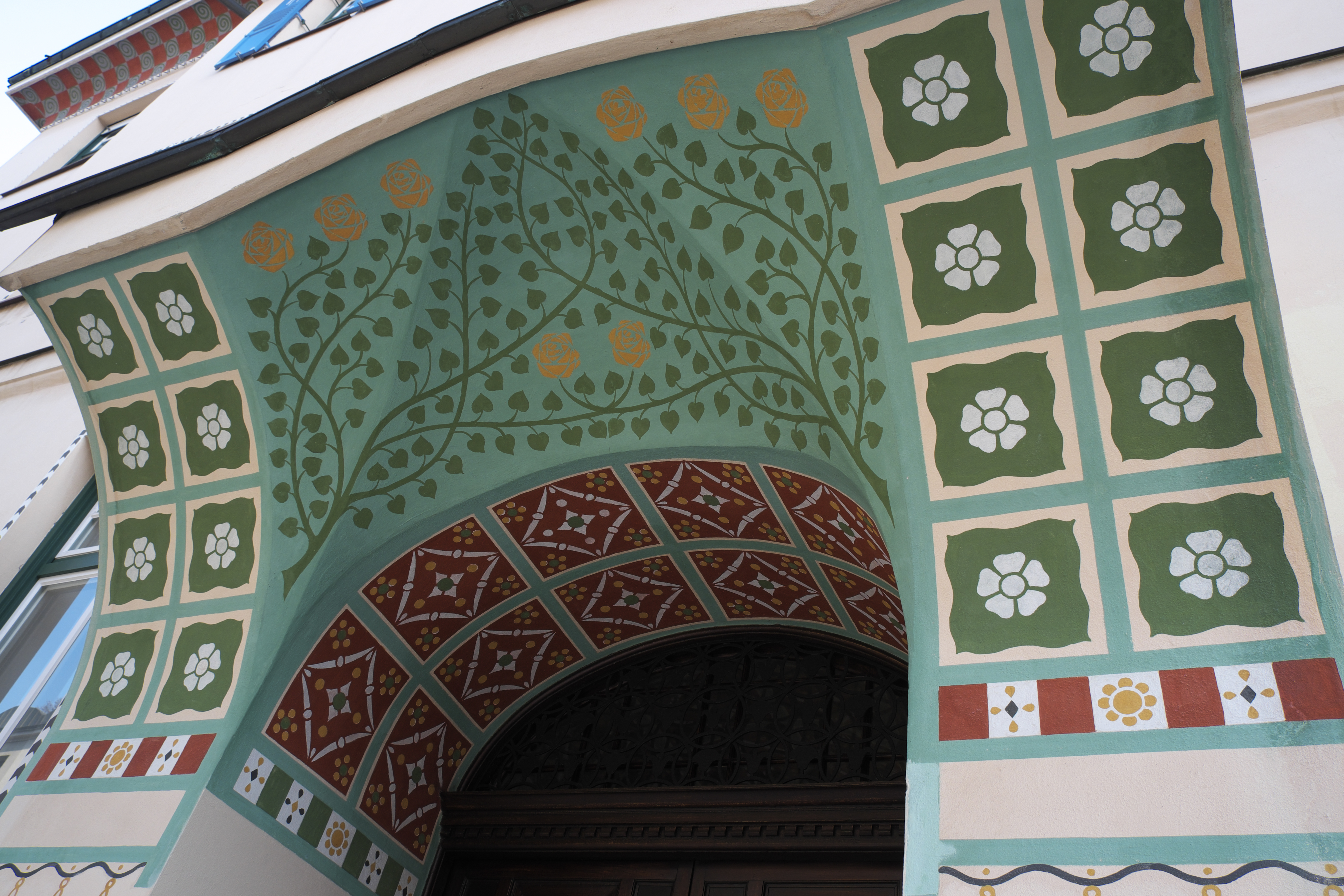 Palais Bissing in der Georgenstraße 10 im Stadtteil Schwabing (Stadtbezirk Schwabing-Freimann) in München (Bayern/Deutschland)